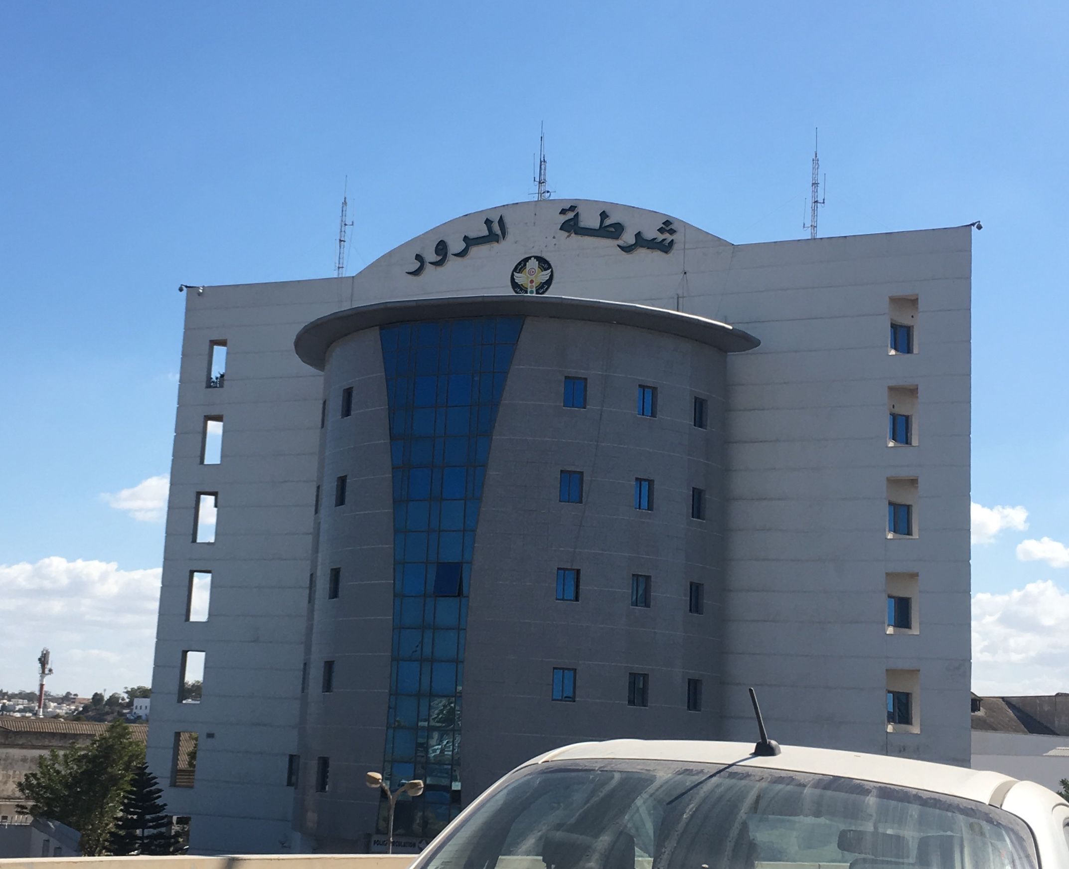 Siège Police de la circulation, Tunis, 2019.